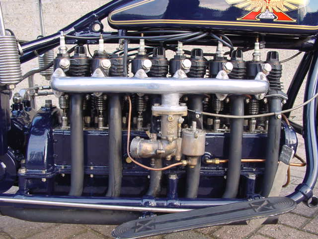 Zeer zeldzame zescilinder lijnmotor van een Henderson motorfiets uit 1926. Langsgeplaatste zescilinder lijnmotor in een Henderson De Luxe Supersix uit 1926.